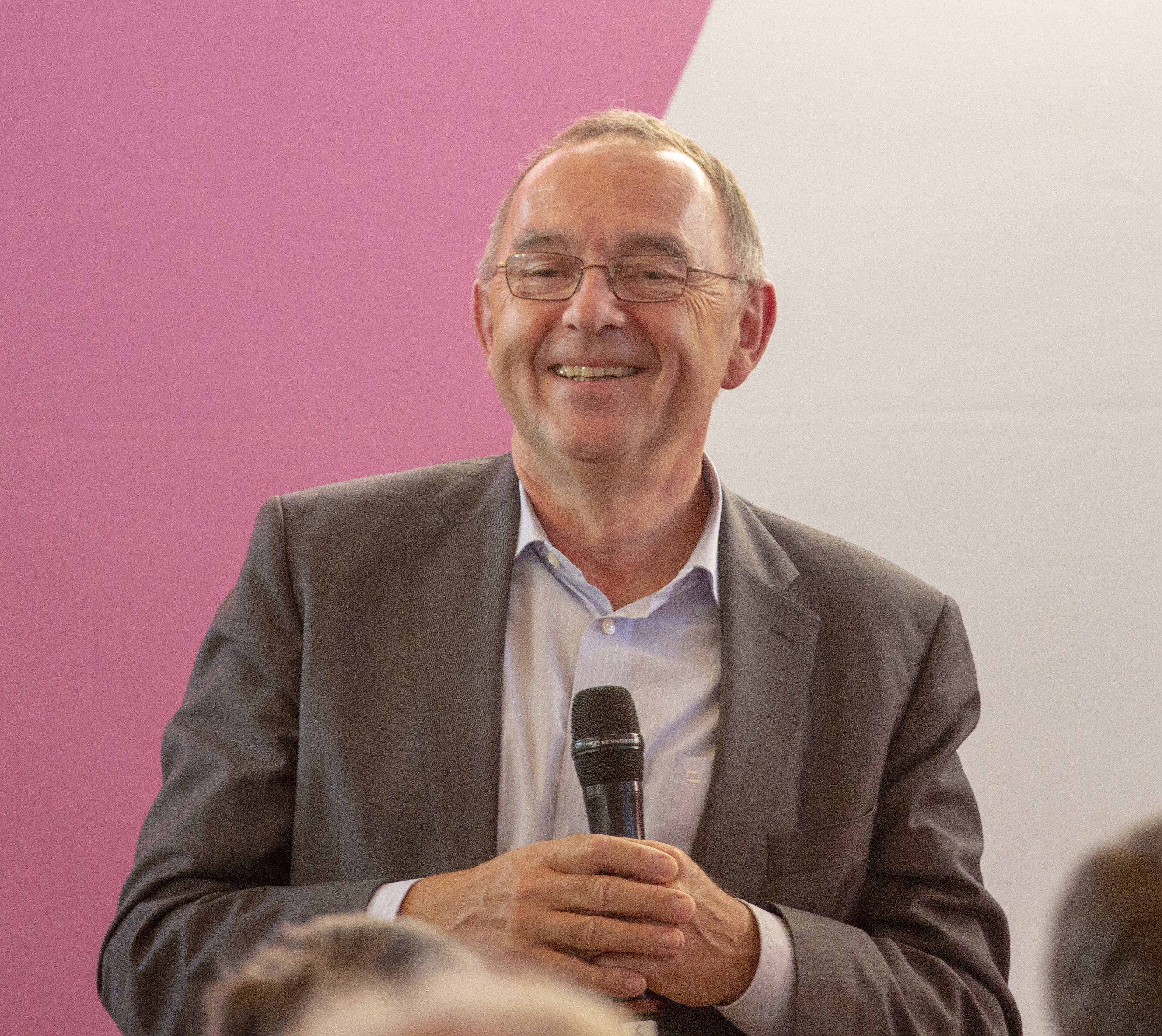 Norbert Walter-Borjans bei der SPD Regionalkonferenz zur Wahl des SPD-Vorsitzes am 10. September 2019 in Nieder-Olm.